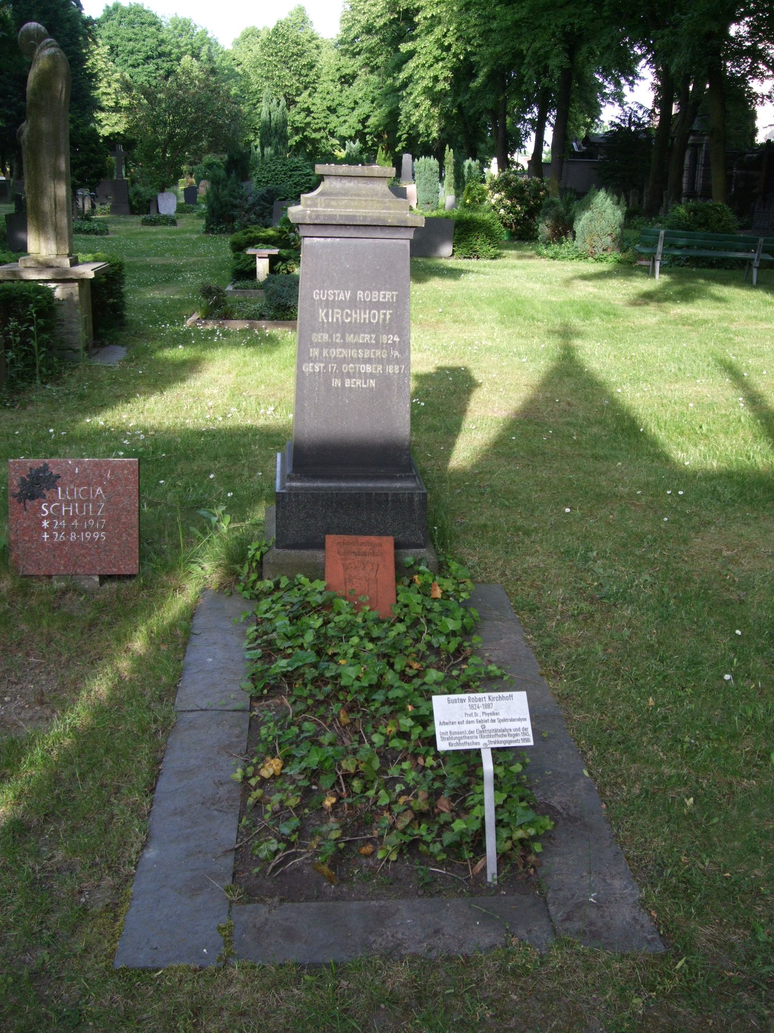 Grab des Physikers Gustav Robert Kirchhoff auf dem alten St. Matthäus-Kirchhof in Berlin-Schöneberg